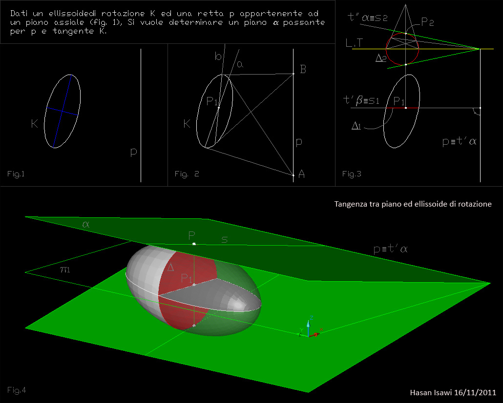 Dati un ellissoide di rotazione K ed una retta p appartenente ad un piano assiale (fig. 1), Si vuole determinare un piano a passante per p e tangente K.